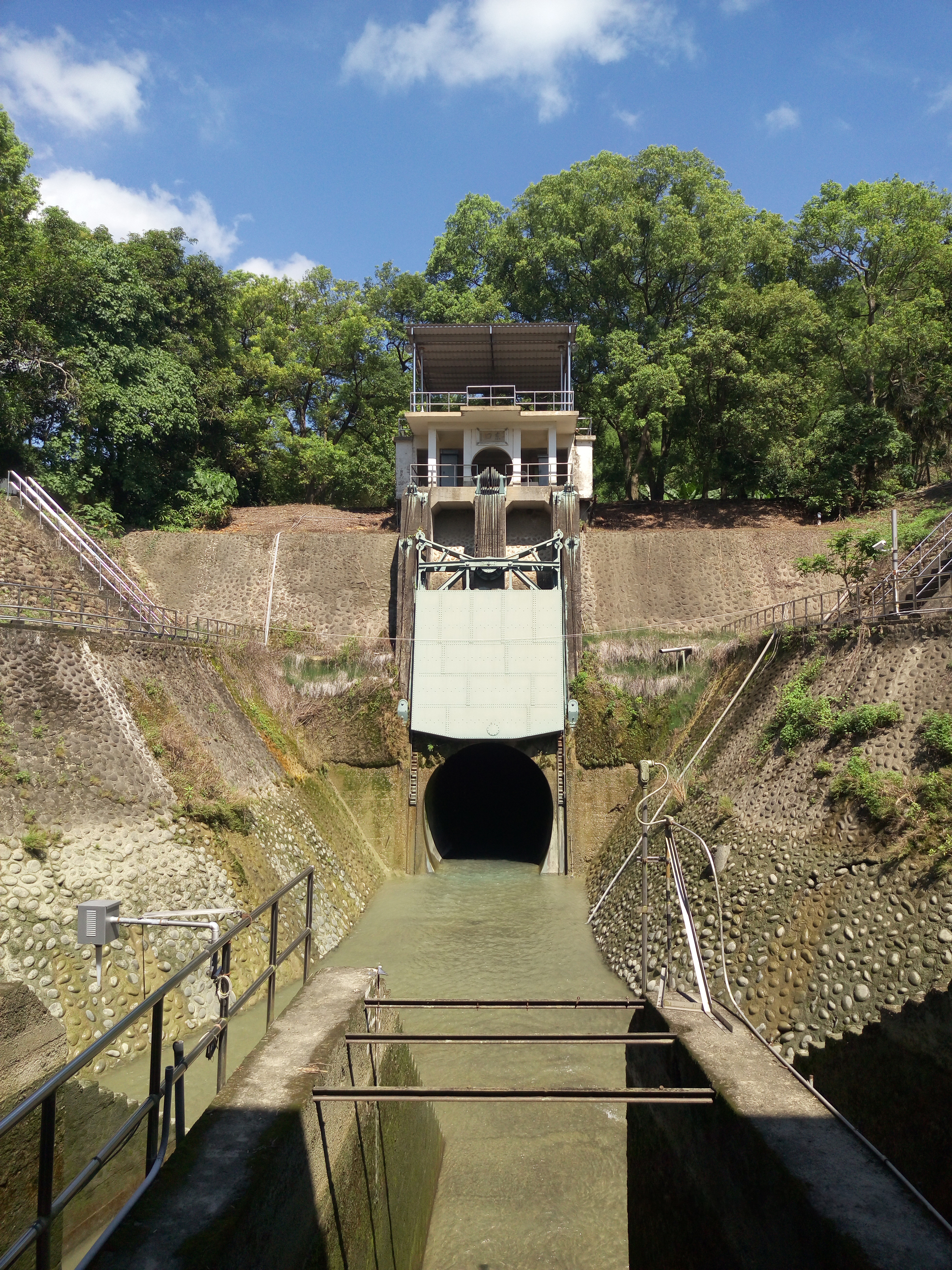 中文（台灣）: 烏山嶺引水隧道 舊線東口正面